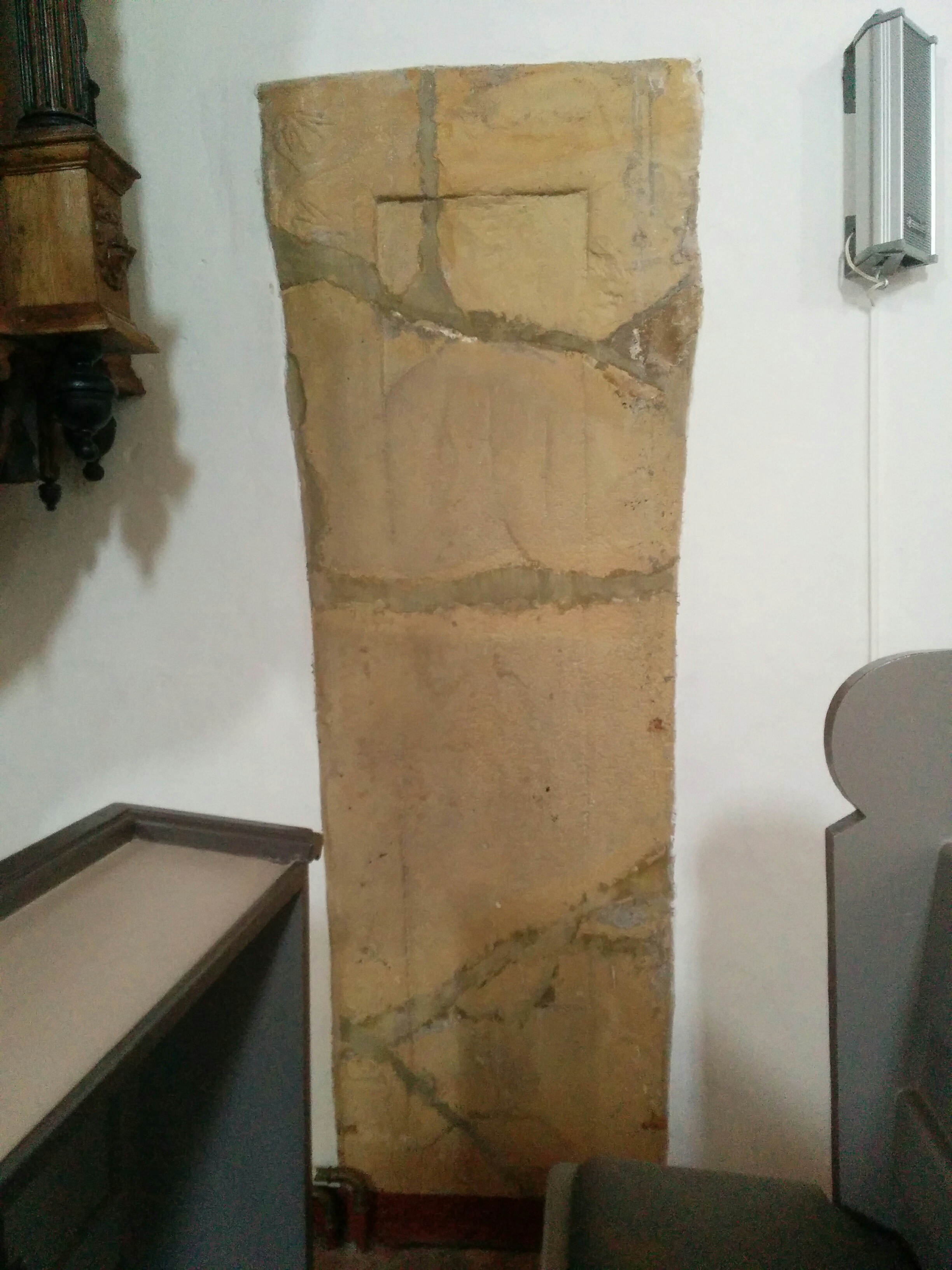 Grabplatte in der Kirche in Ditzum